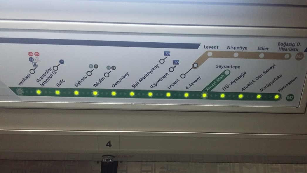 M2 Hattı